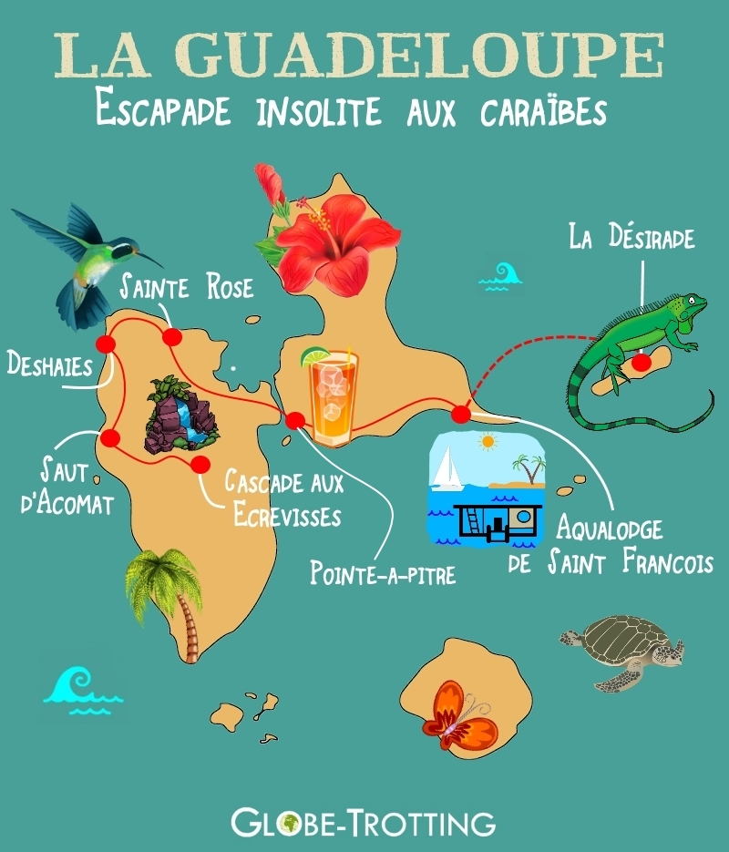 Escapade Insolite en Guadeloupe : quelques points d'intérêts